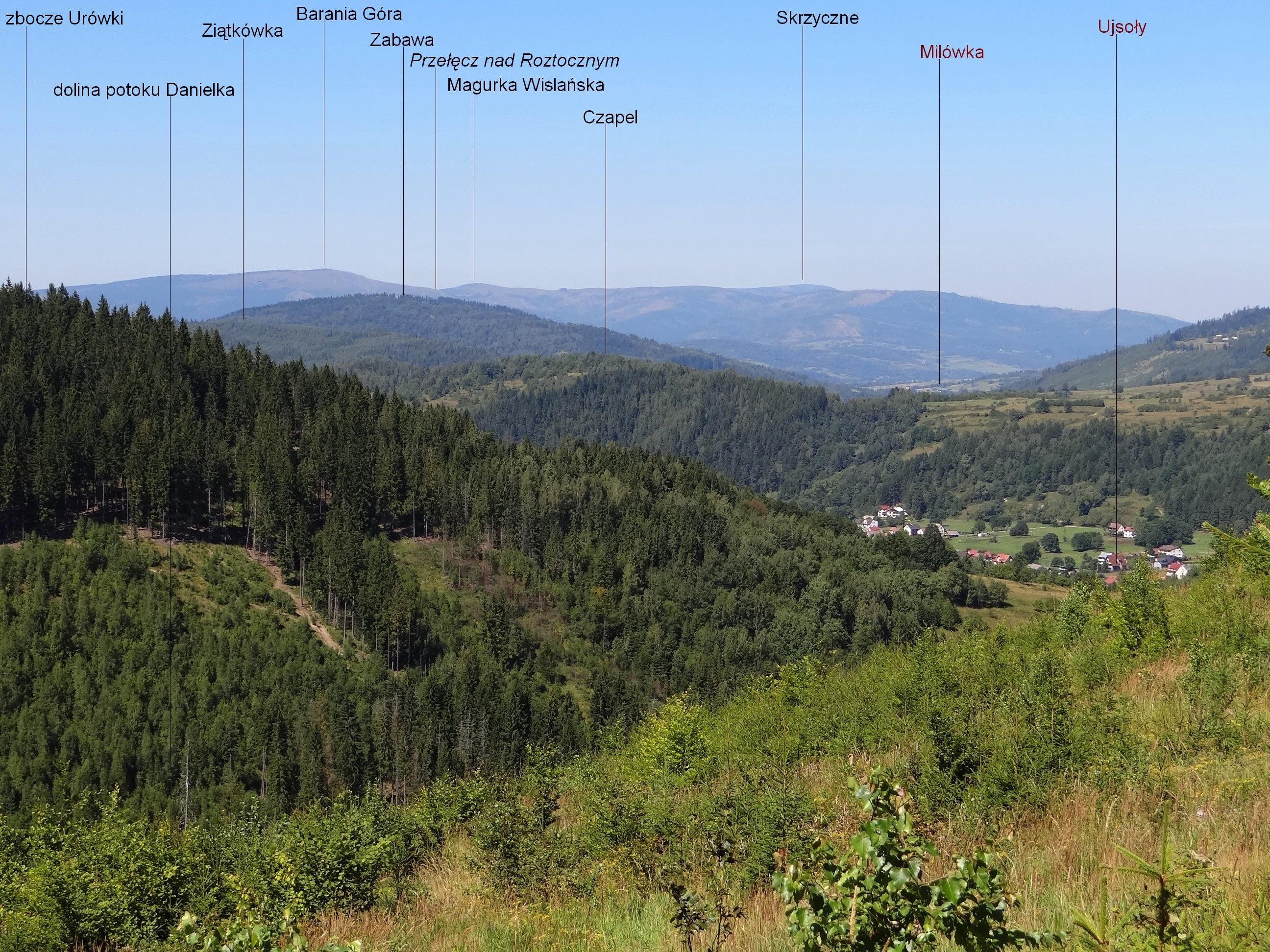 Danielka w Ujsołach